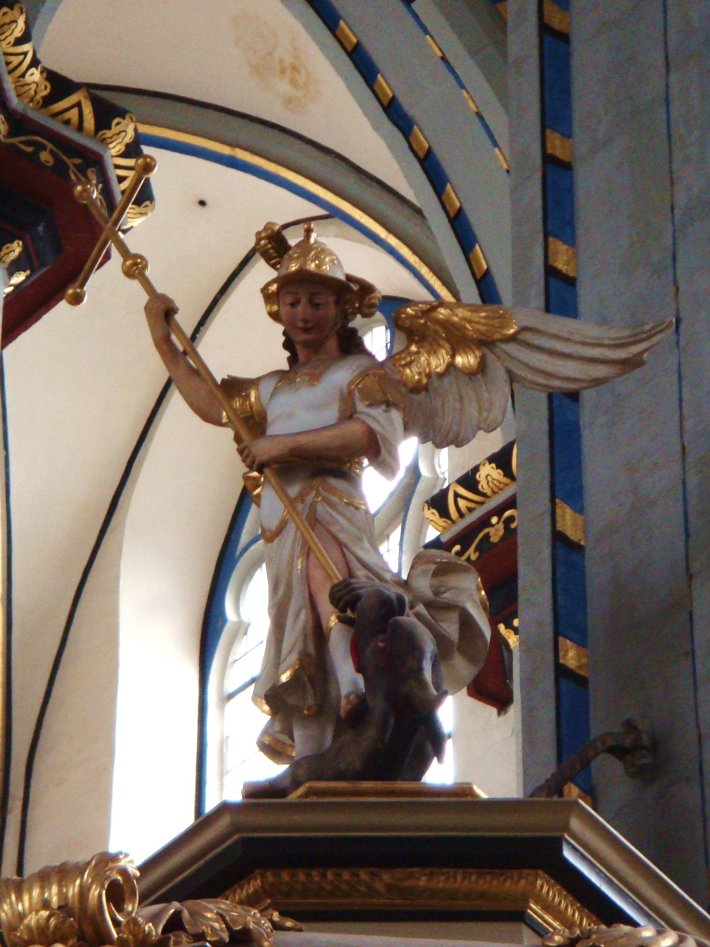 Erzengel Michael auf der Kanzel der Bonner Namen-Jesu-Kirche